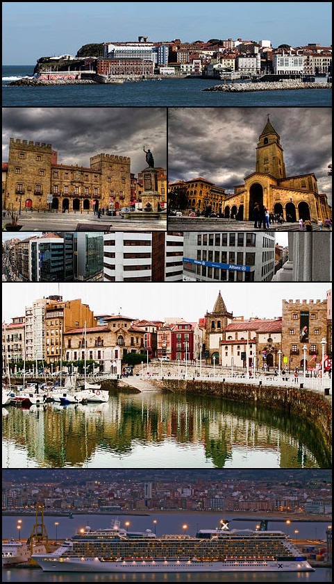 Gijón. Primera fila: panorámica del barrio de Cimadevilla y del Cerro de Santa Catalina. Segunda fila izquierda: Palacio de Revillagigedo y estatua de Don Pelayo. Segunda fila derecha: Iglesia de San Pedro. Tercera fila: edificios en la calle Munuza. Cuarta fila: Puerto deportivo, casas de Cimadevilla y Colegiata de San Juan Bautista anexa al Palacio de Revillagigedo. Quinta fila: vista de Gijón con el puerto del El Musel en primer plano.